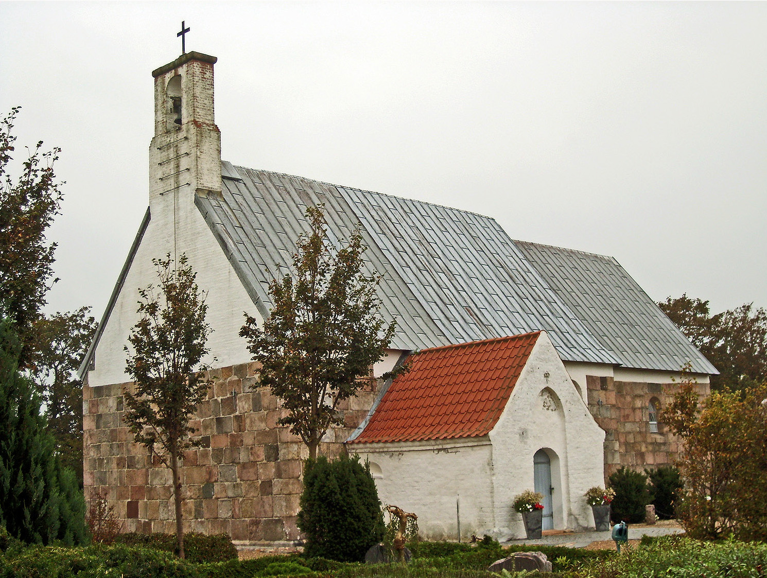 fra sydvest